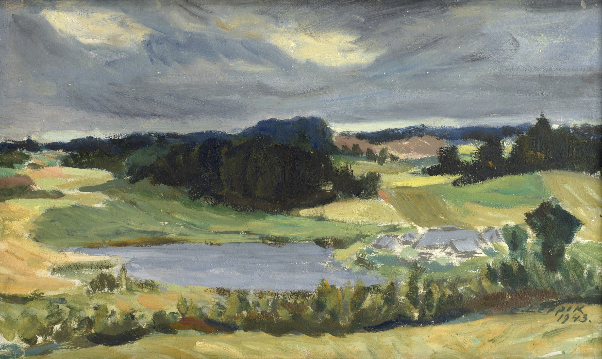 Elmar Leppiku maal "Kellamehe järv Otepääl"